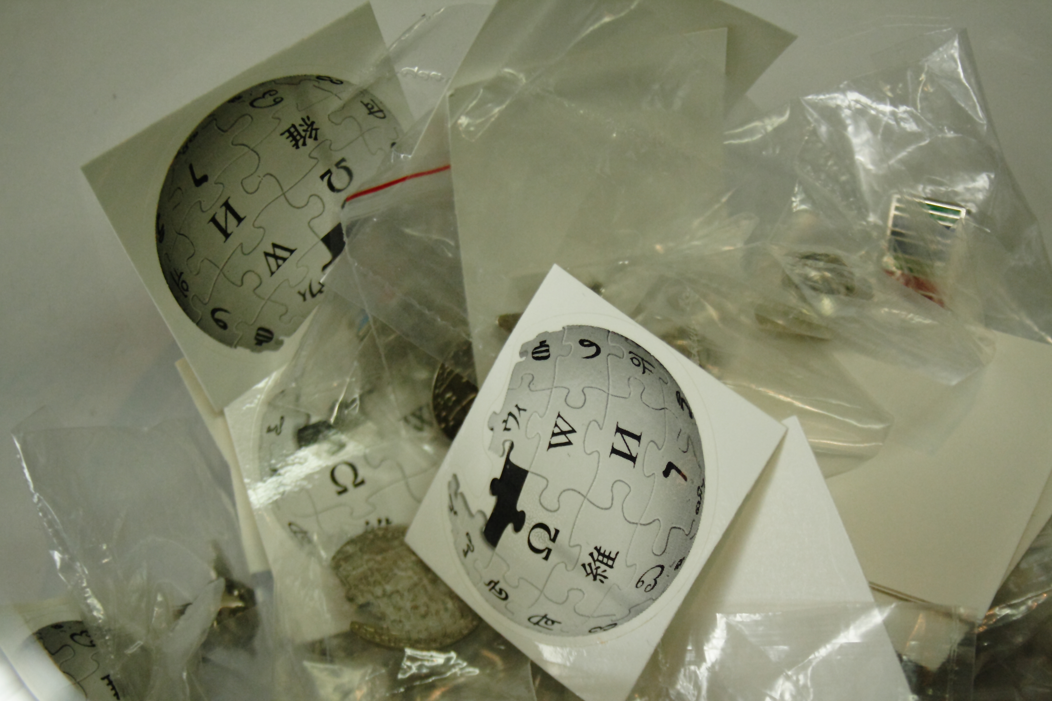 Stickers y pines de Wikipedia durante la Wikimanía 2015.